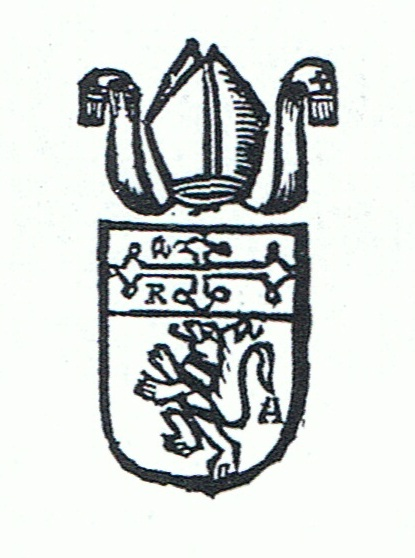 Stemma di mons. Sigismondo Gambacorta, vescovo di Telese o Cerreto dal 1613 al 1636. Fonte: Ferdinando Ughelli, Italia Sacra, 1648.